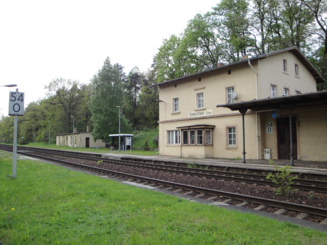 Bahnhof Seitschen, Gemeinde Göda, Landkreis Bautzen. Hornjoserbsce: Dwórnišćo Žičeń, gmejna Hodźij, wokrjes Budyšin.